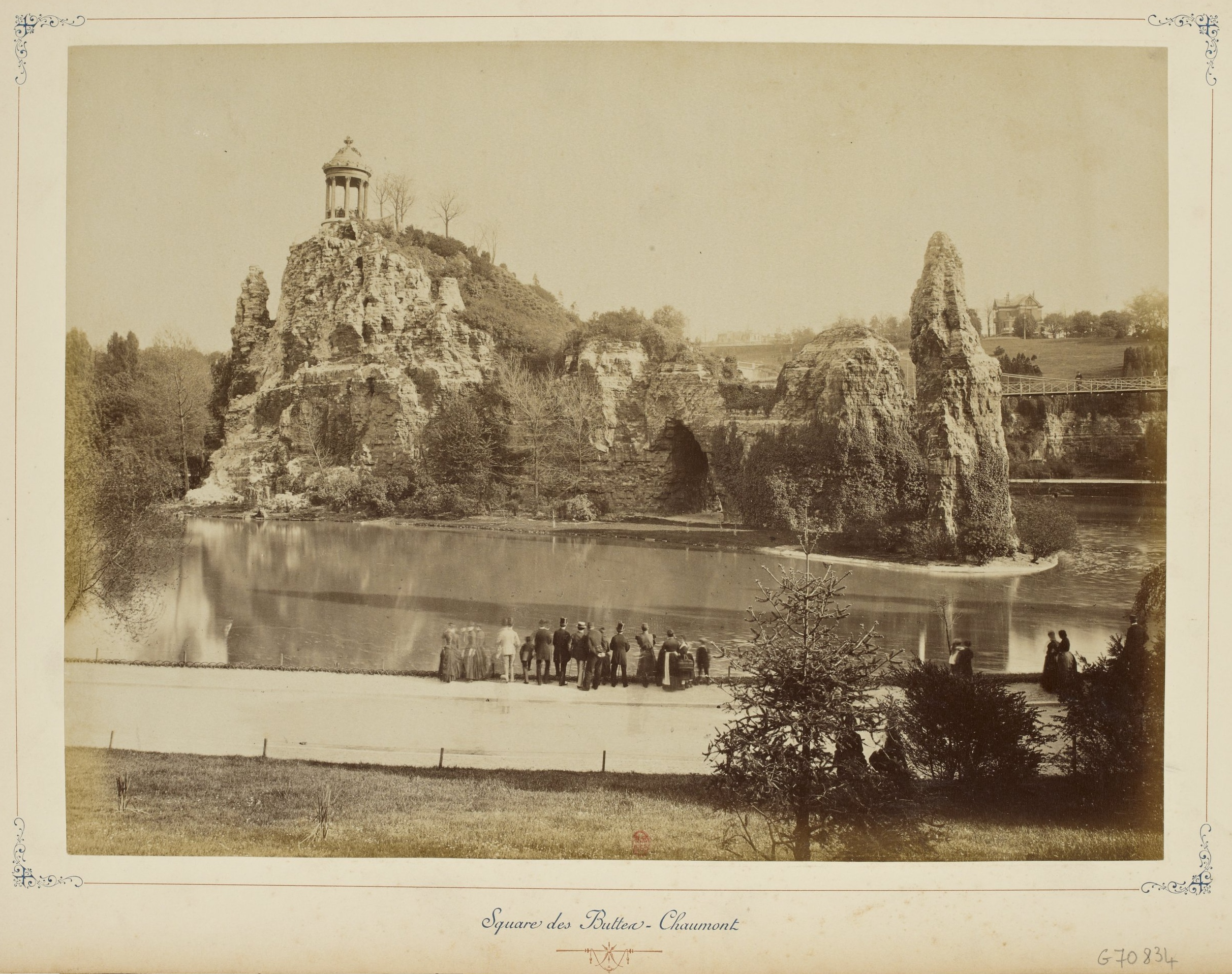 Paris et ses environs. Square des Buttes-Chaumont